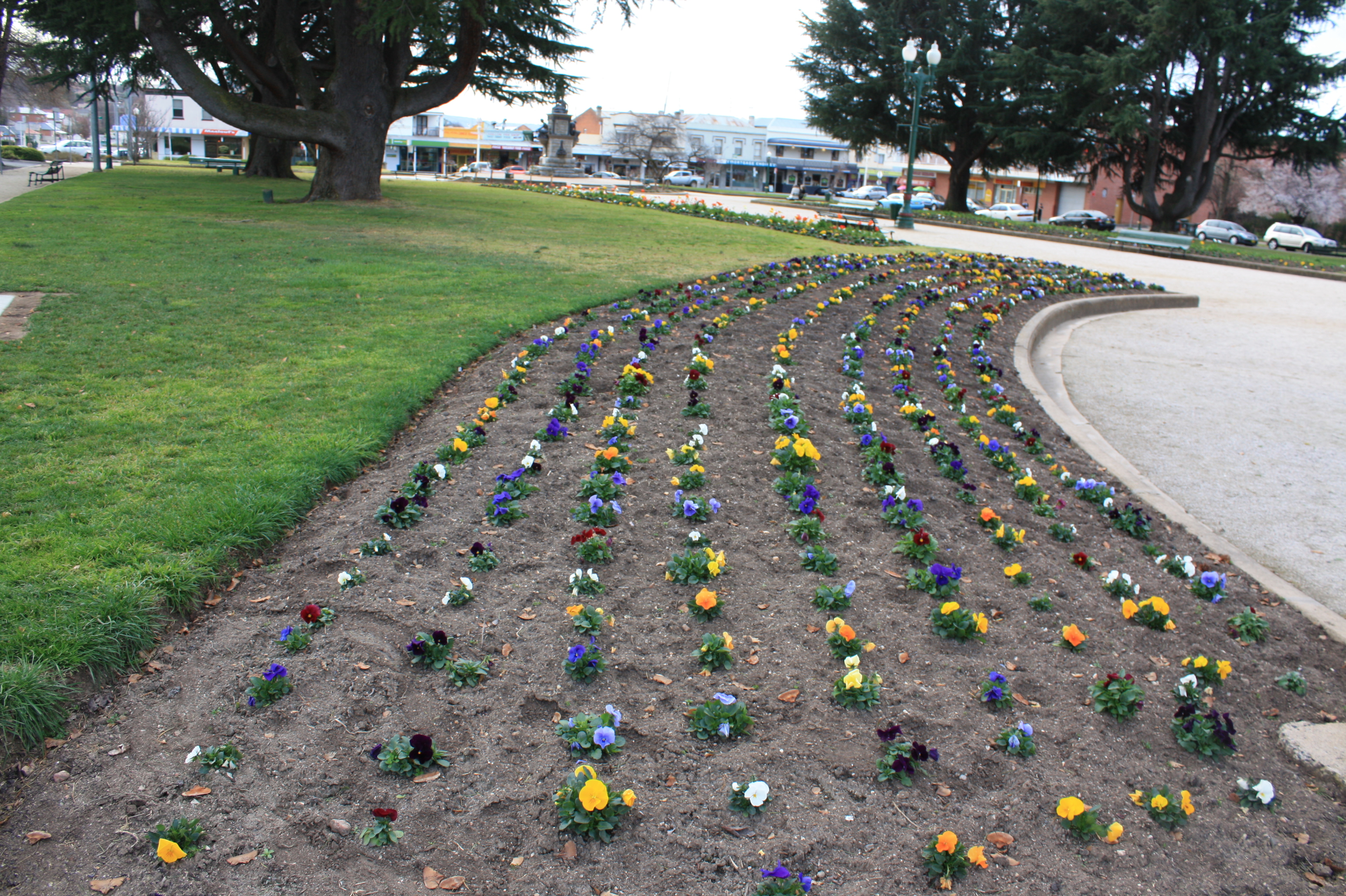 Pansies on Parade